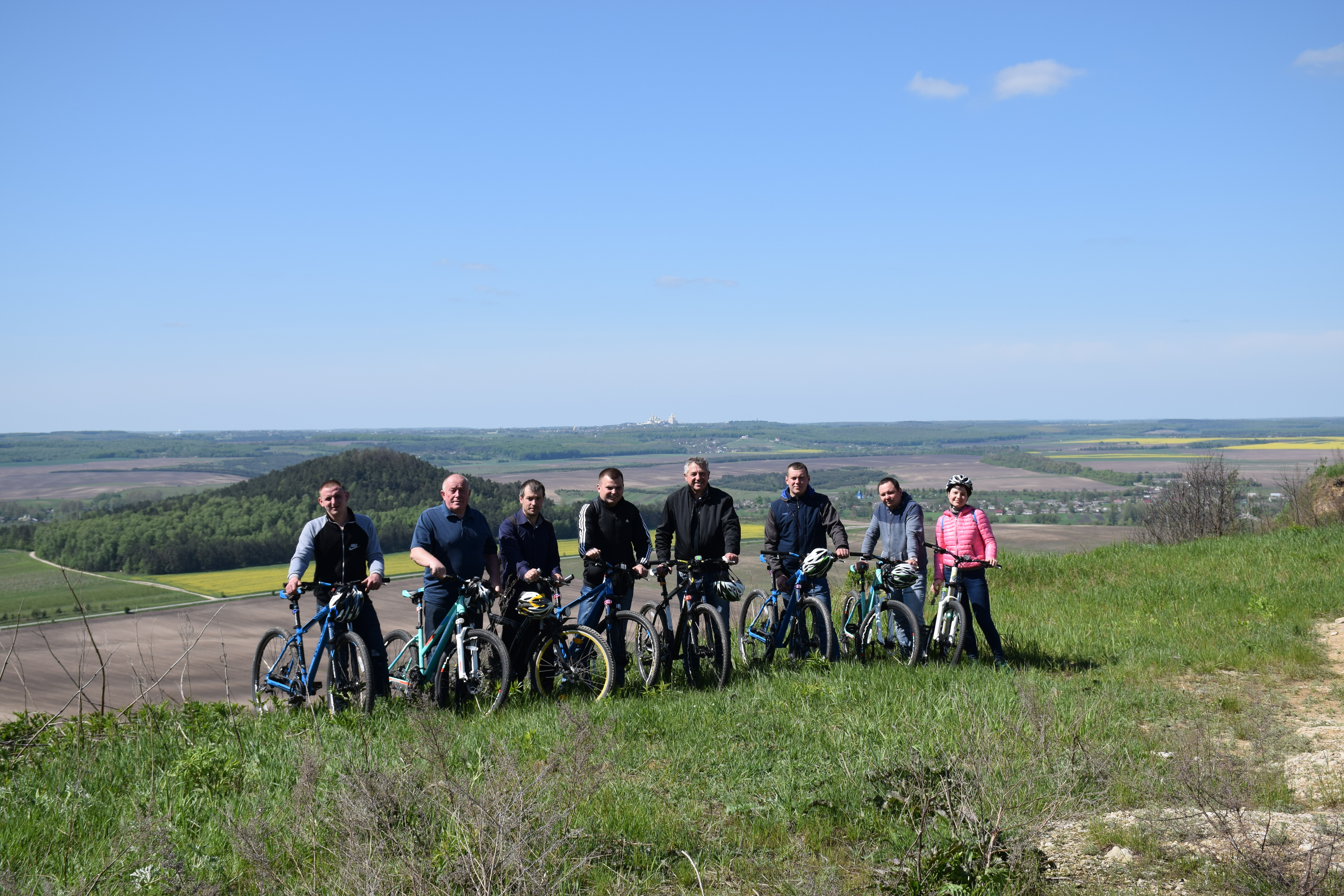 Велосипедний маршрут №1 «Навколо Кременецьких гір»